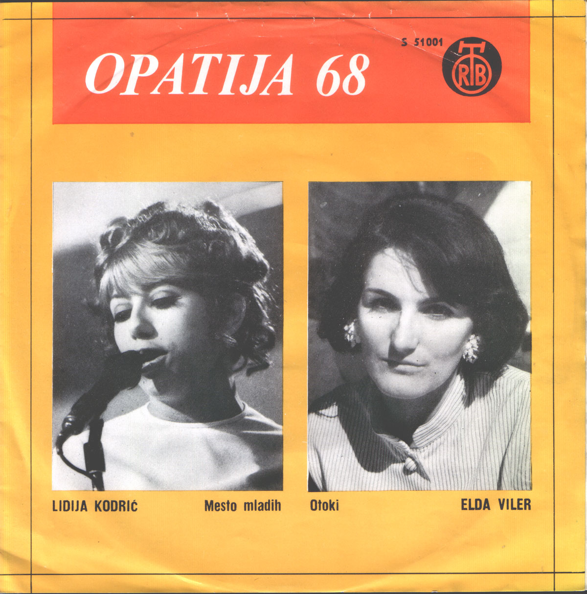 Album Opatija 68 pevk Elde Viler in Lidije Kodrič.